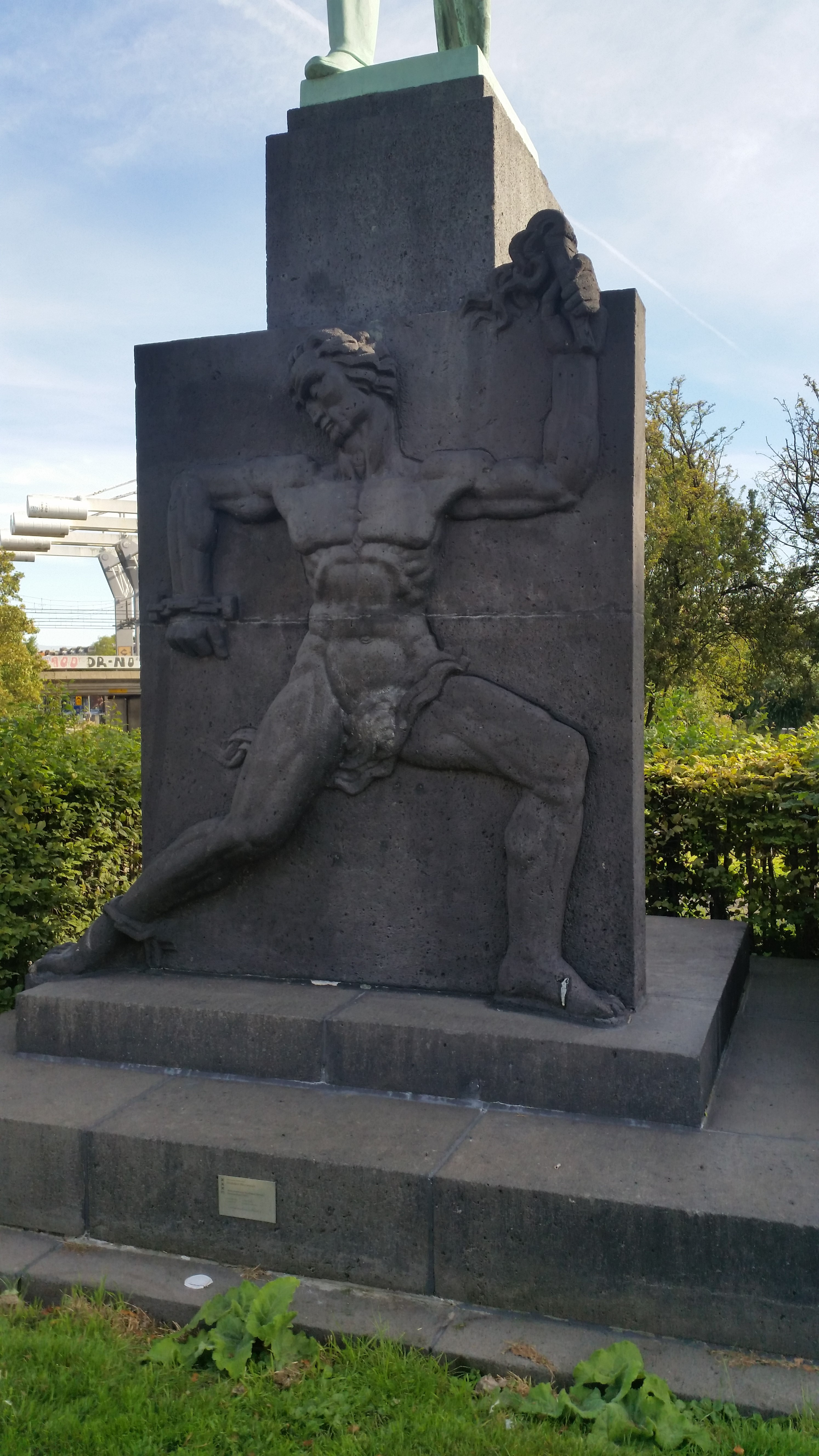 Prometheus van Statue of Ferdinand Domela Nieuwenhuis (Amsterdam)